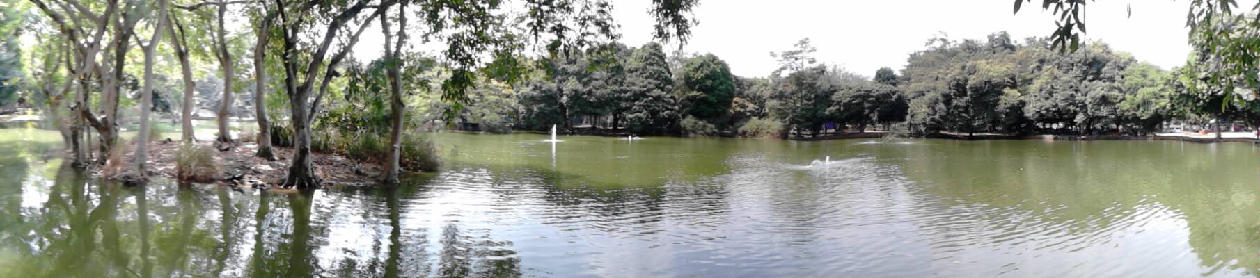 El lago de Univalle, el cual de hecho es un lago artificial. Esta fotografía fue tomada en el municipio colombiano con código 76001.